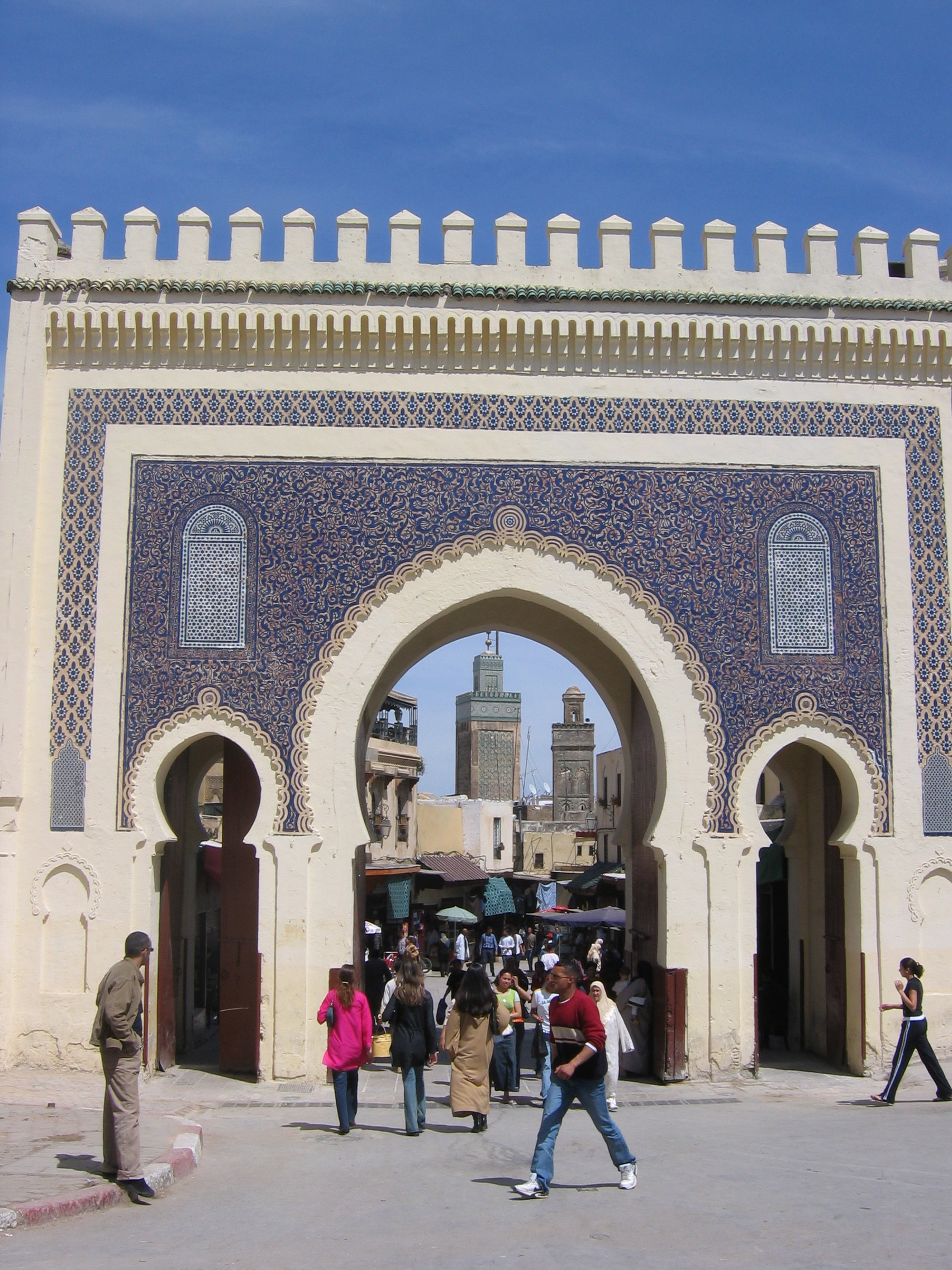 La porte de Bab Bou Jeloud à Fès